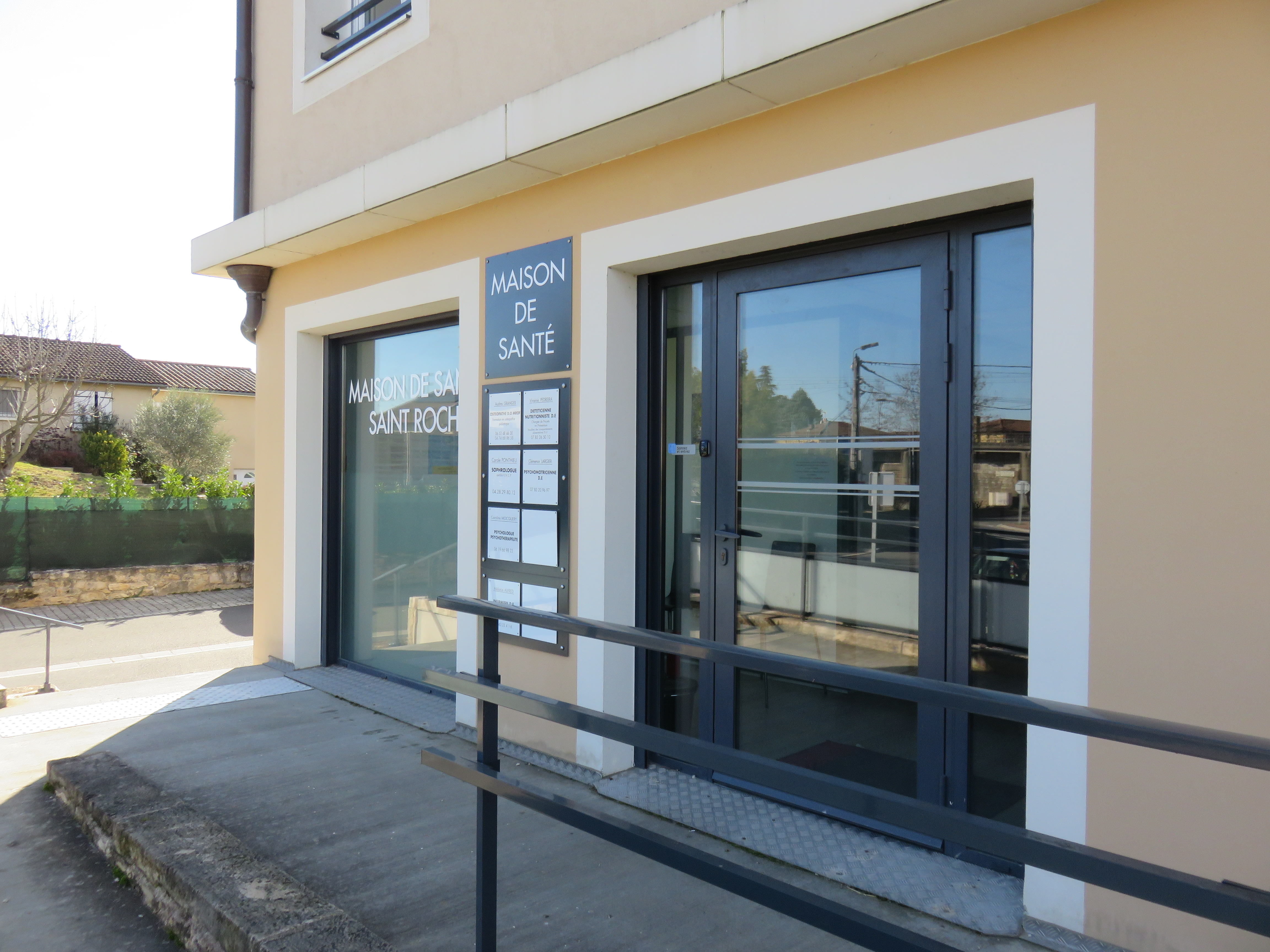 Maison de santé à Ambérieux (Rhône, France).